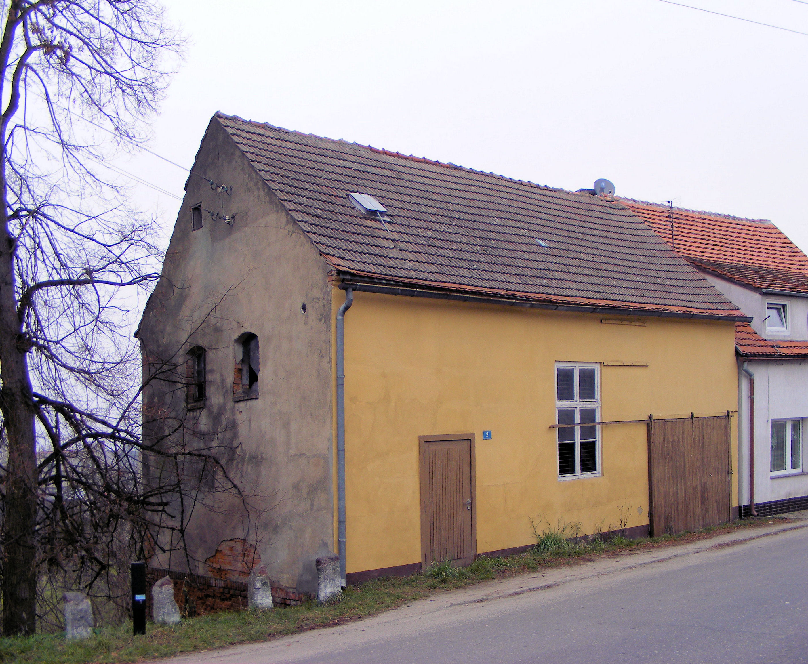 Budynek dawnej synagogi w Pszczewie.